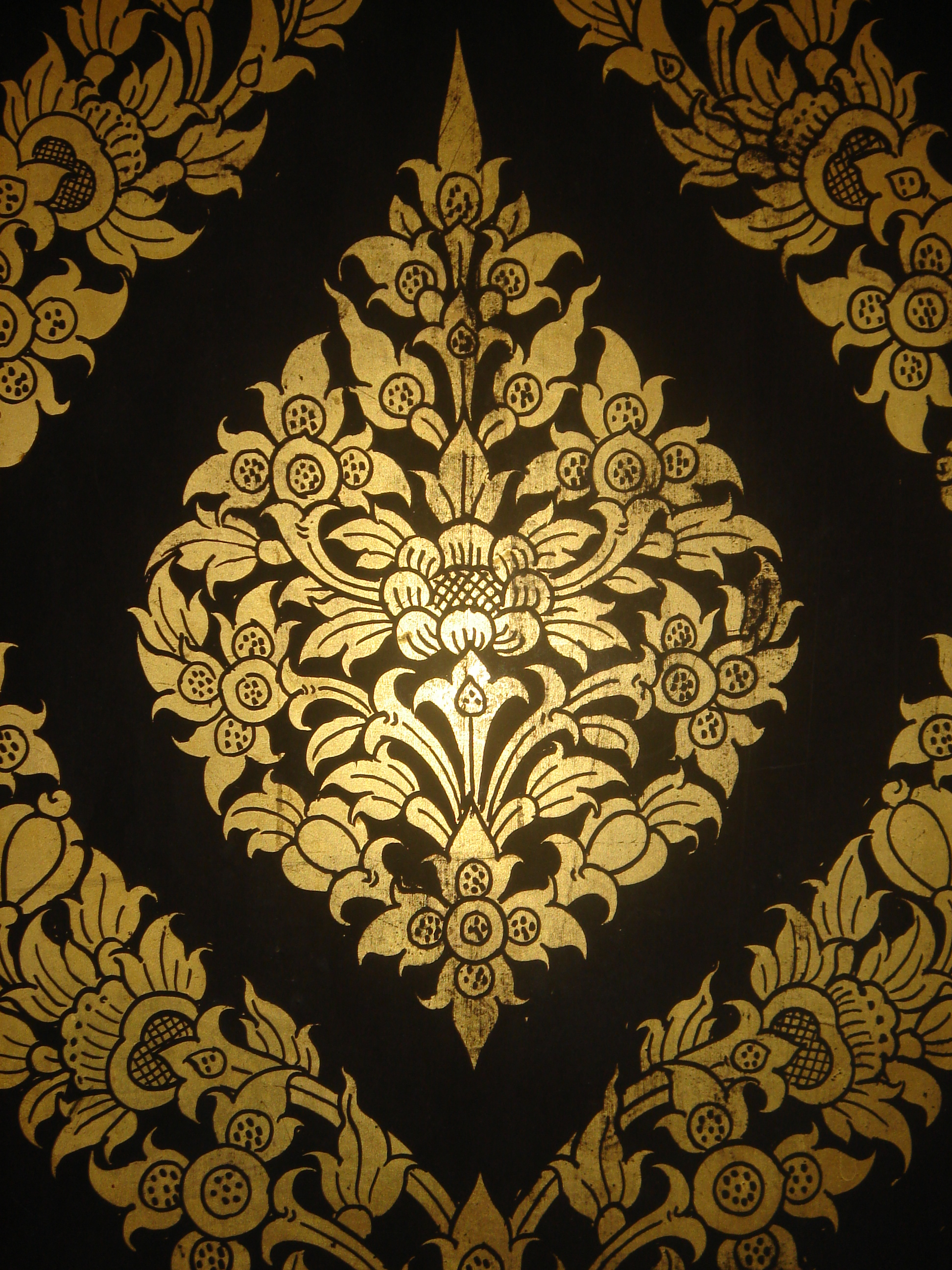 Lacquer Work at a door in Grand Palace, Bangkok (Schwarzgoldlack-Malerei)